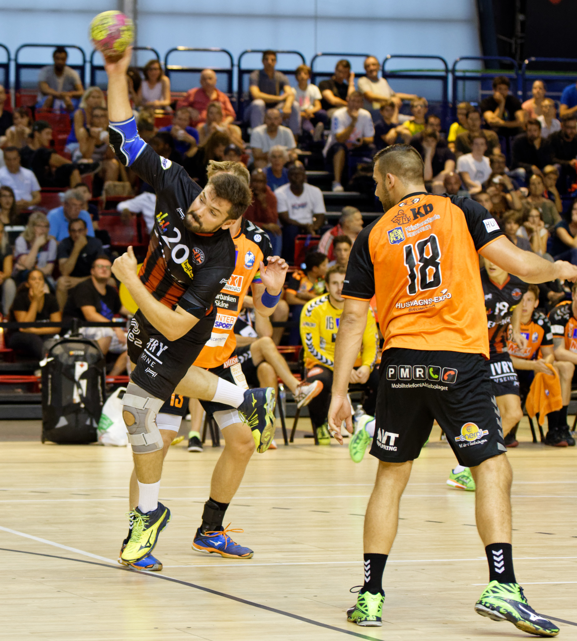 Rencontre du challenge Marrane 2016 entre l'US Ivry et les danois de IFK Kristianstad. A la Halle Carpentier (Paris 13e), le 04 septembre 2016.